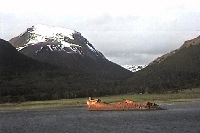 El vapor de carga y pasajeros "Monte Sarmiento" naufragado en las aguas del canal Beagle, frenta a la Estancia Remolino en el año 1912. Provincia de Tierra del Fuego, Antártida e Islas del Atlántico Sur, Argentina.